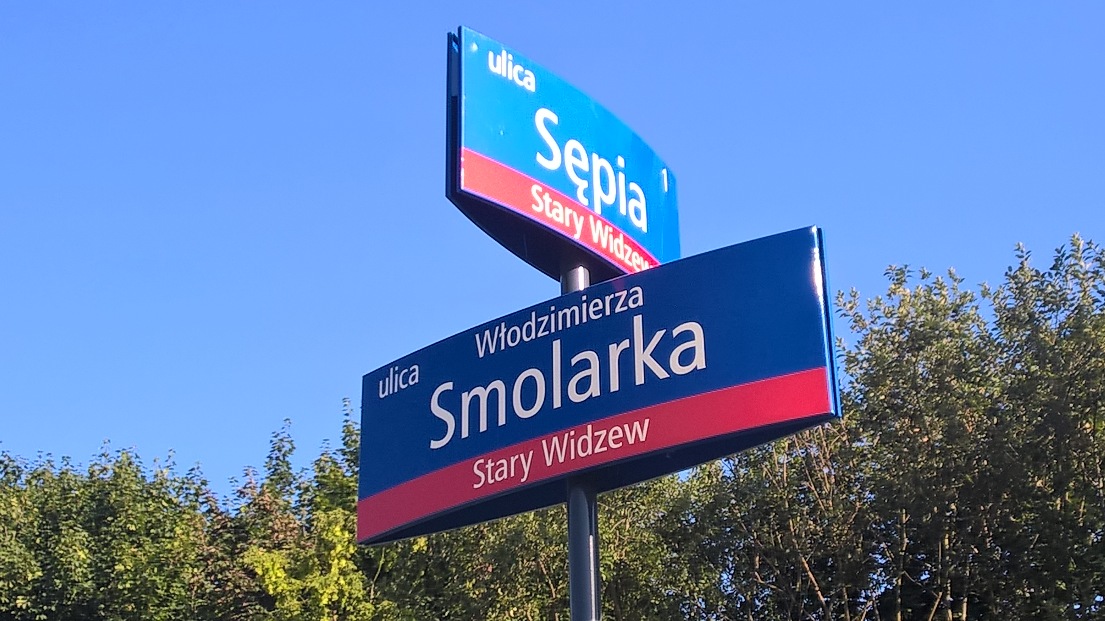 System Informacji Miejskiej w Łodzi – skrzyżowanie ulic Sępiej i Smolarka